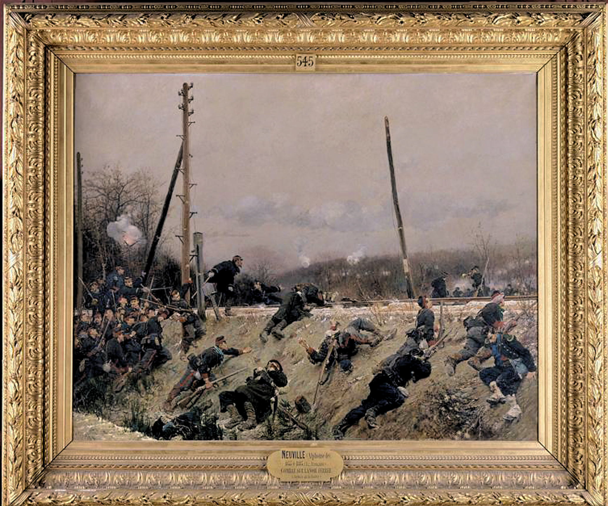 Combat sur une voie ferrée; armée de la Loire, 1870–1871, oil on canvas, 172 cm × 216 cm, Chantilly, musée Condé, PE545.